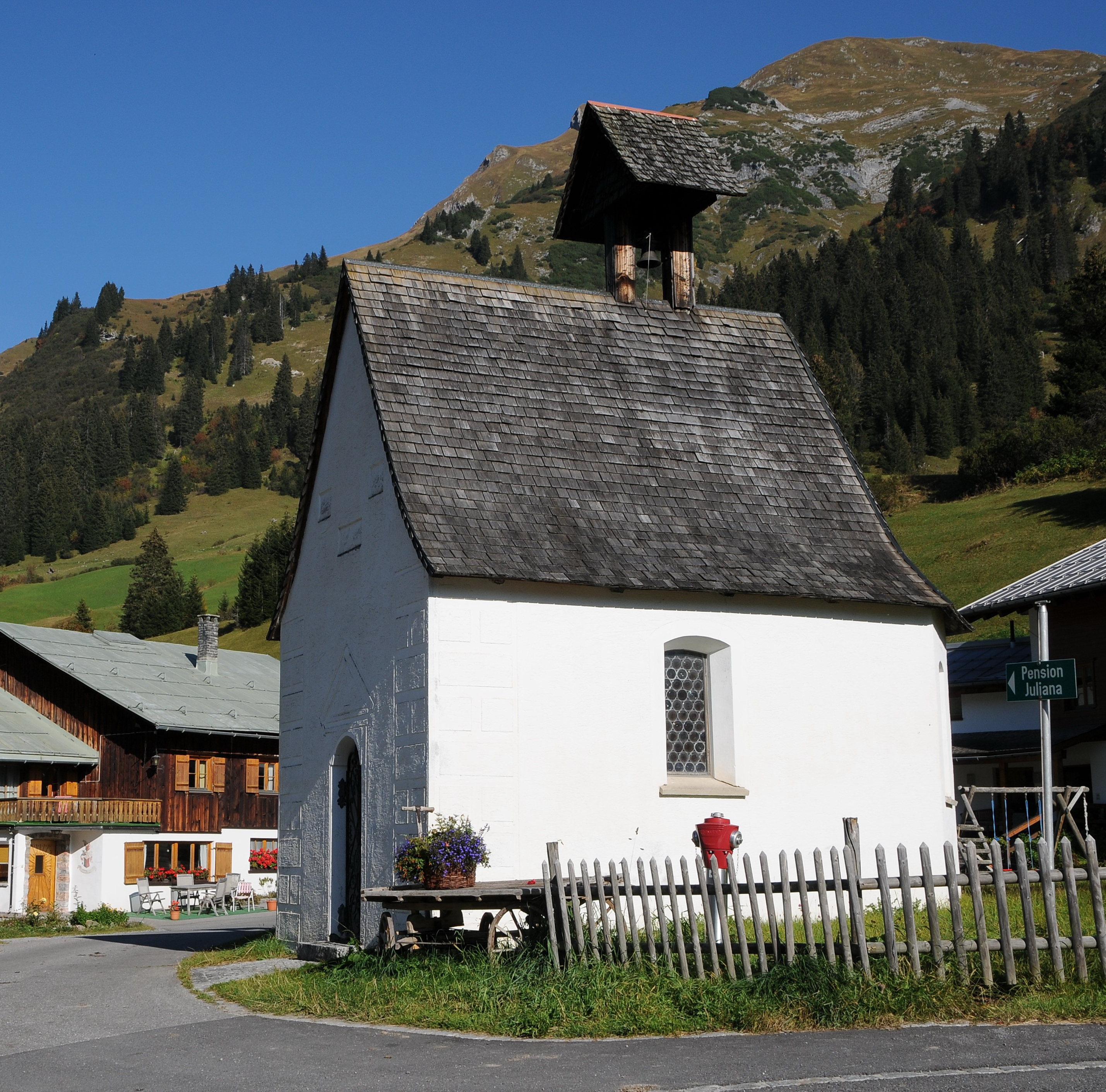 Kapelle hl. Markus in Stubenbach in Lech (Vorarlberg).